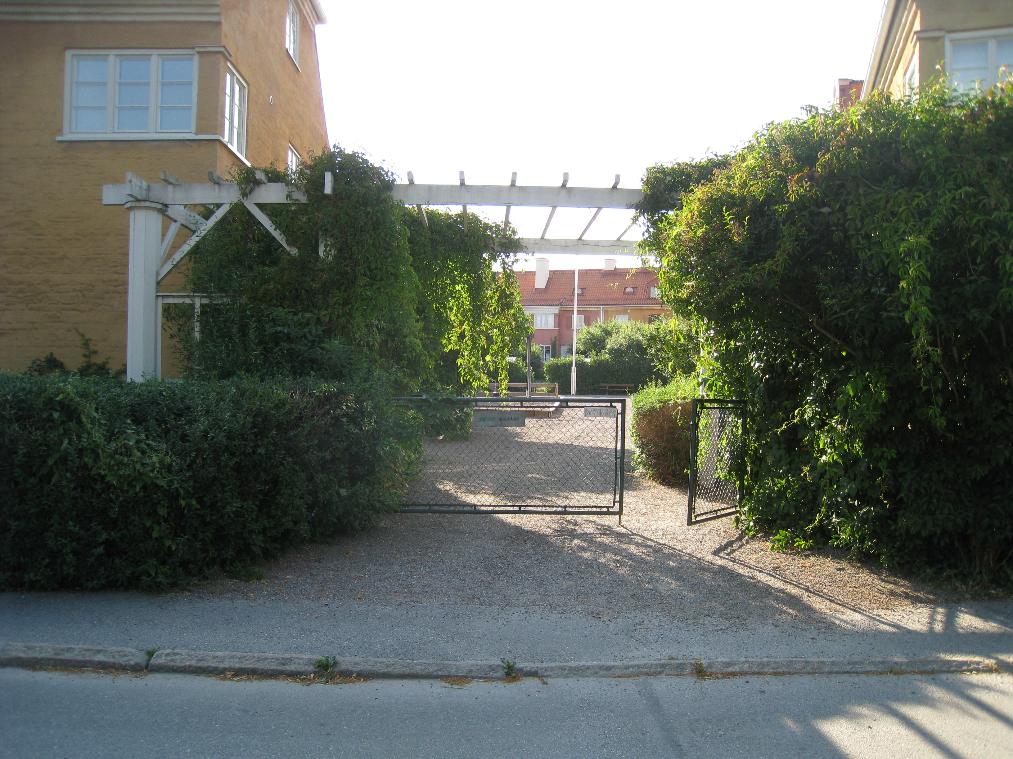 Radhusen i kvarteret Drivbänken i Äppelviken, Bromma.